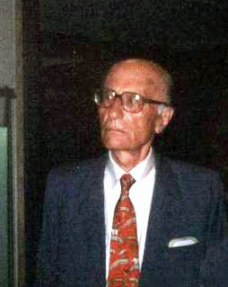 Indro Montanelli (1909-2001), al Teatro Nuovo di Milano, alla presentazione de La Voce